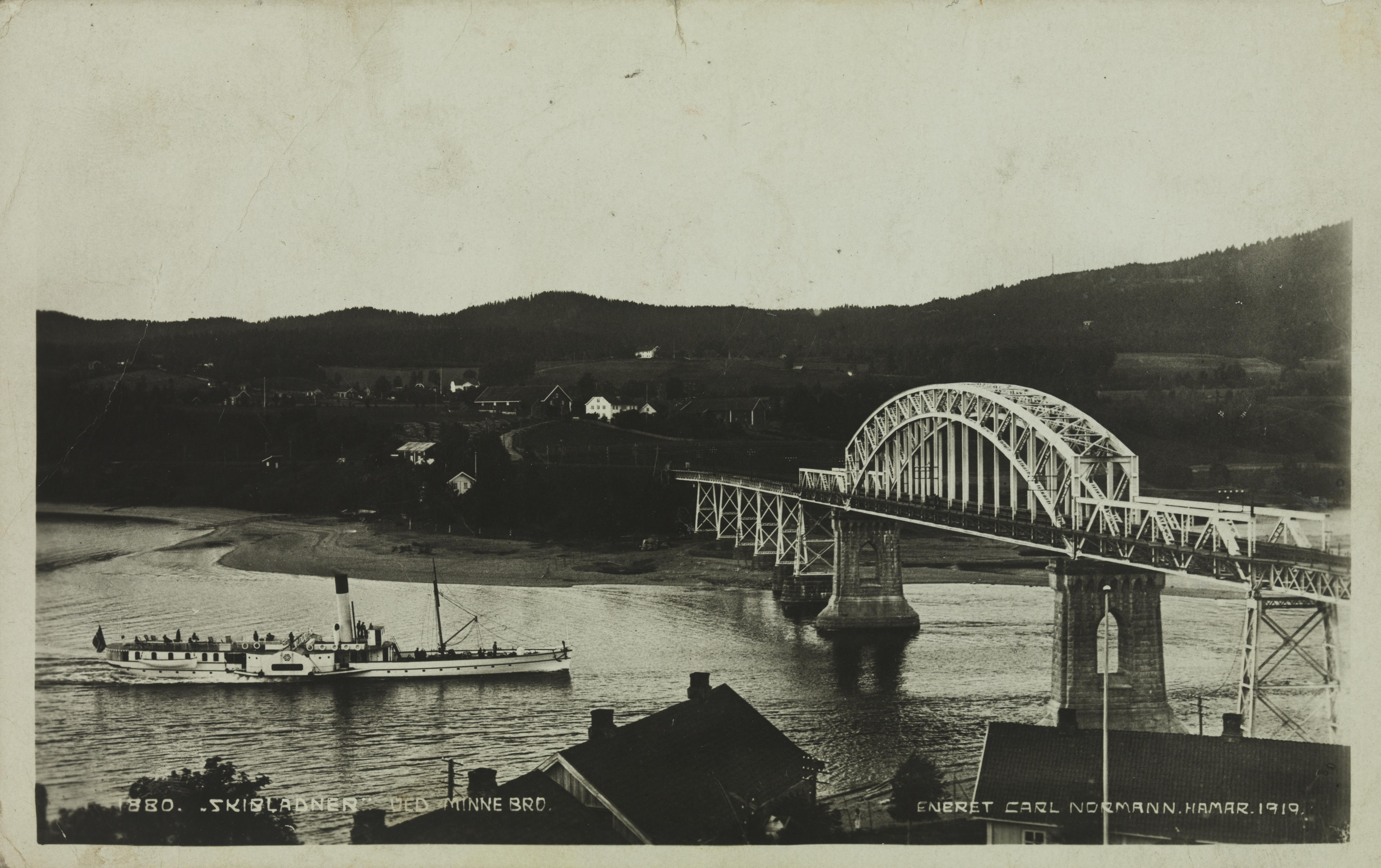 Bildet er hentet fra Nasjonalbibliotekets bildesamling Minne bru,Minnesund, Eidsvoll, Akershus